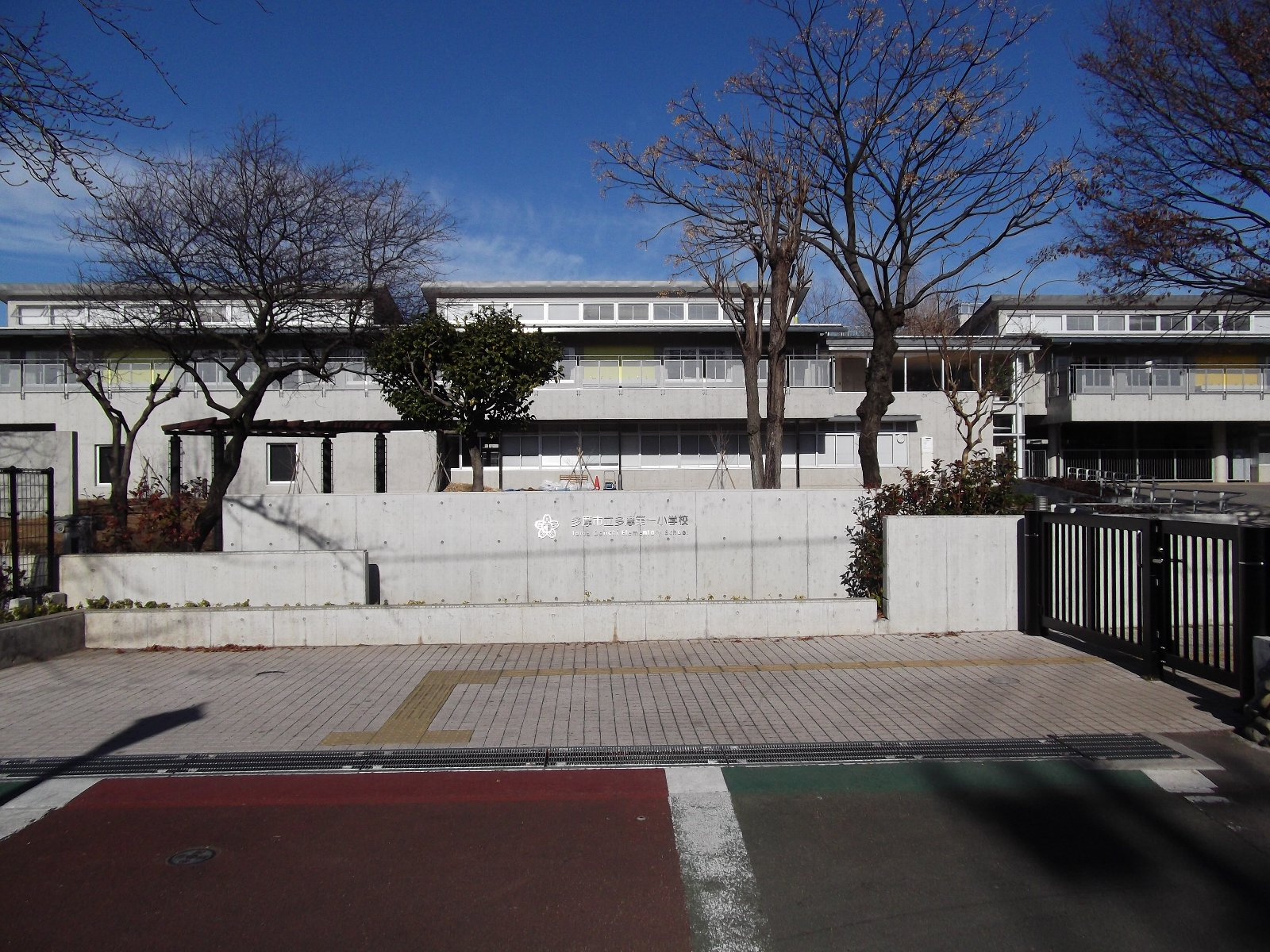 多摩市立多摩第一小学校